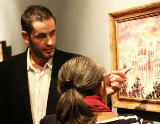 El pintor Miquel Cazaña